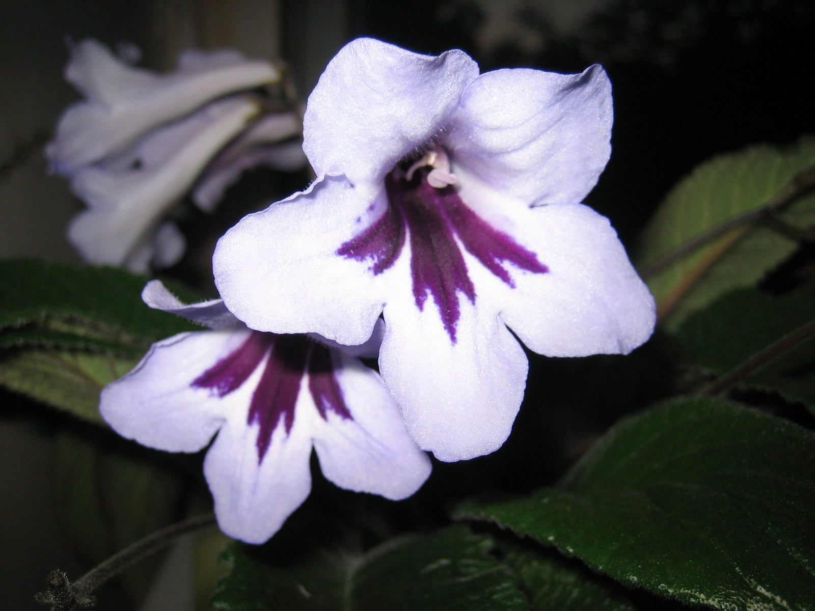 Viola